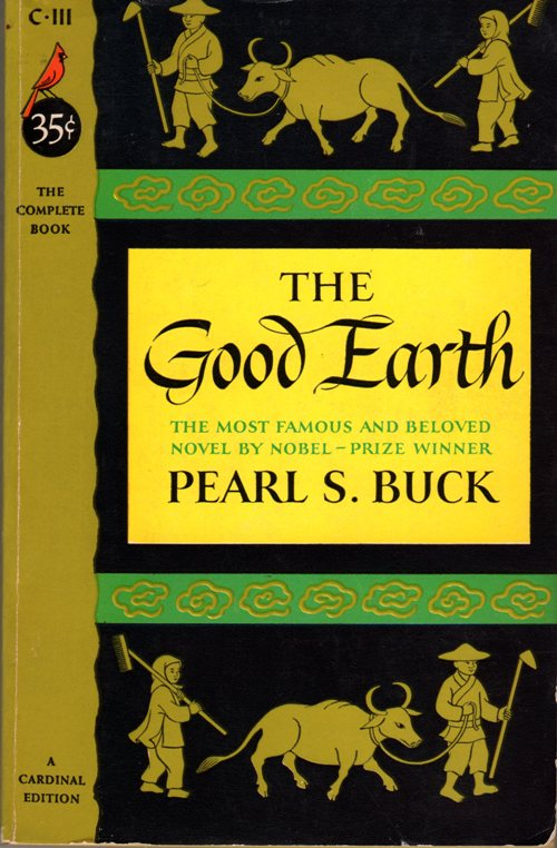 Estas bildo de la libro "La Bona Tero" de Pearl S. Buck.